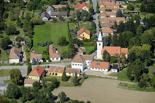 Ikervár légi fotó